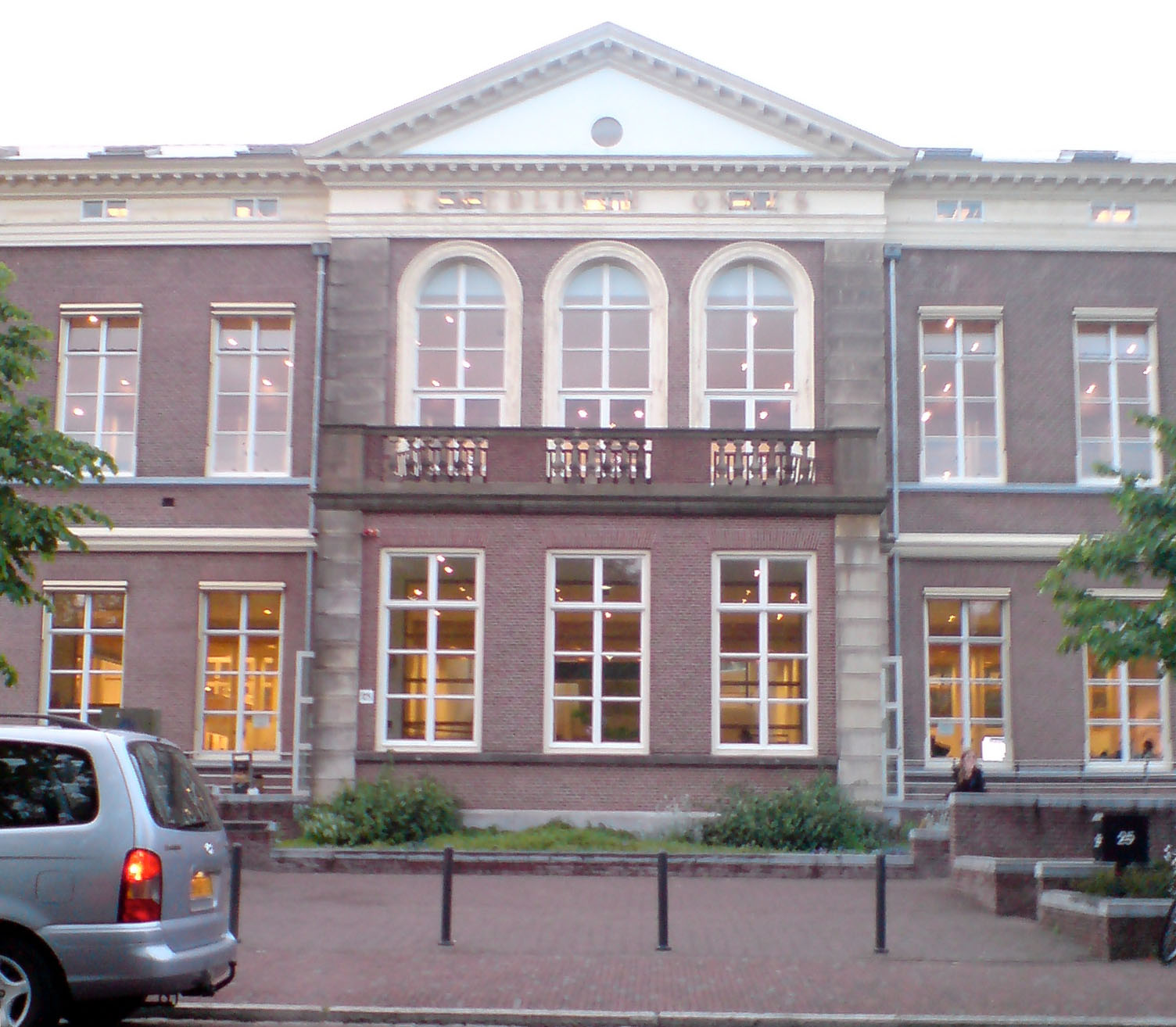 Kamerlingh Onnes Gebouw, Leiden University, at Steenschuur 25 in Leiden